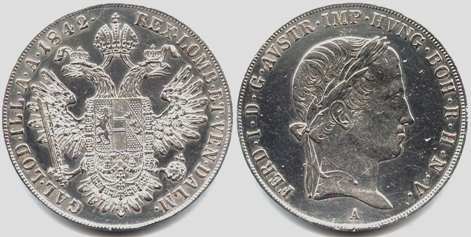 1 талер Австрия